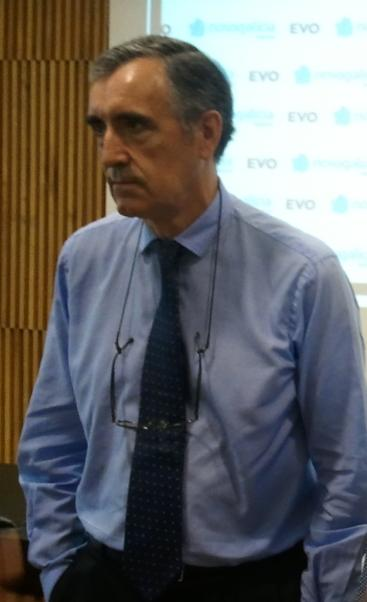 O empresario Xosé María Castellano nunha rolda de prensa no 2012.